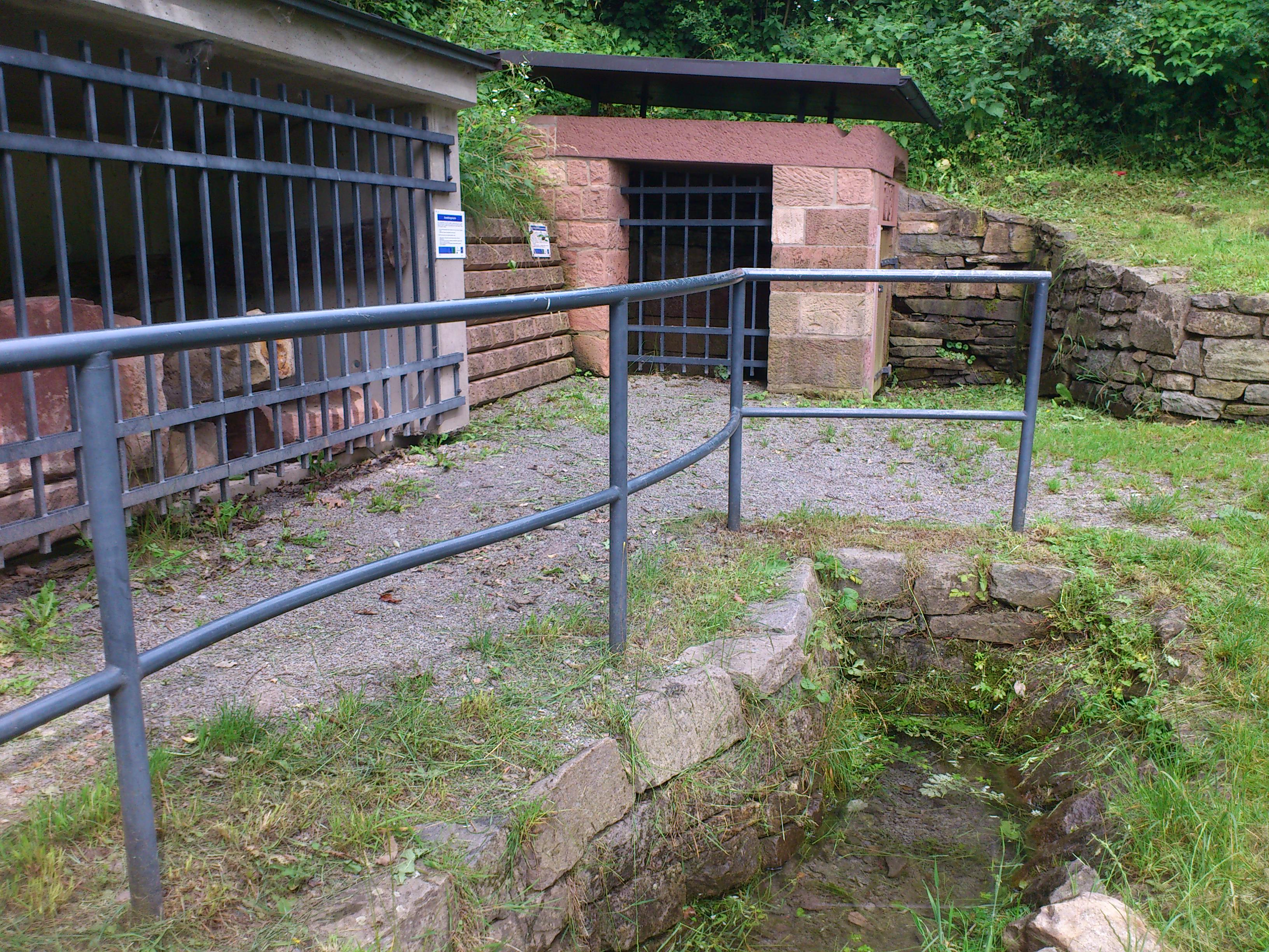 Die Brunnenstube in Haibach, der Ursprung des Kühruhgraben